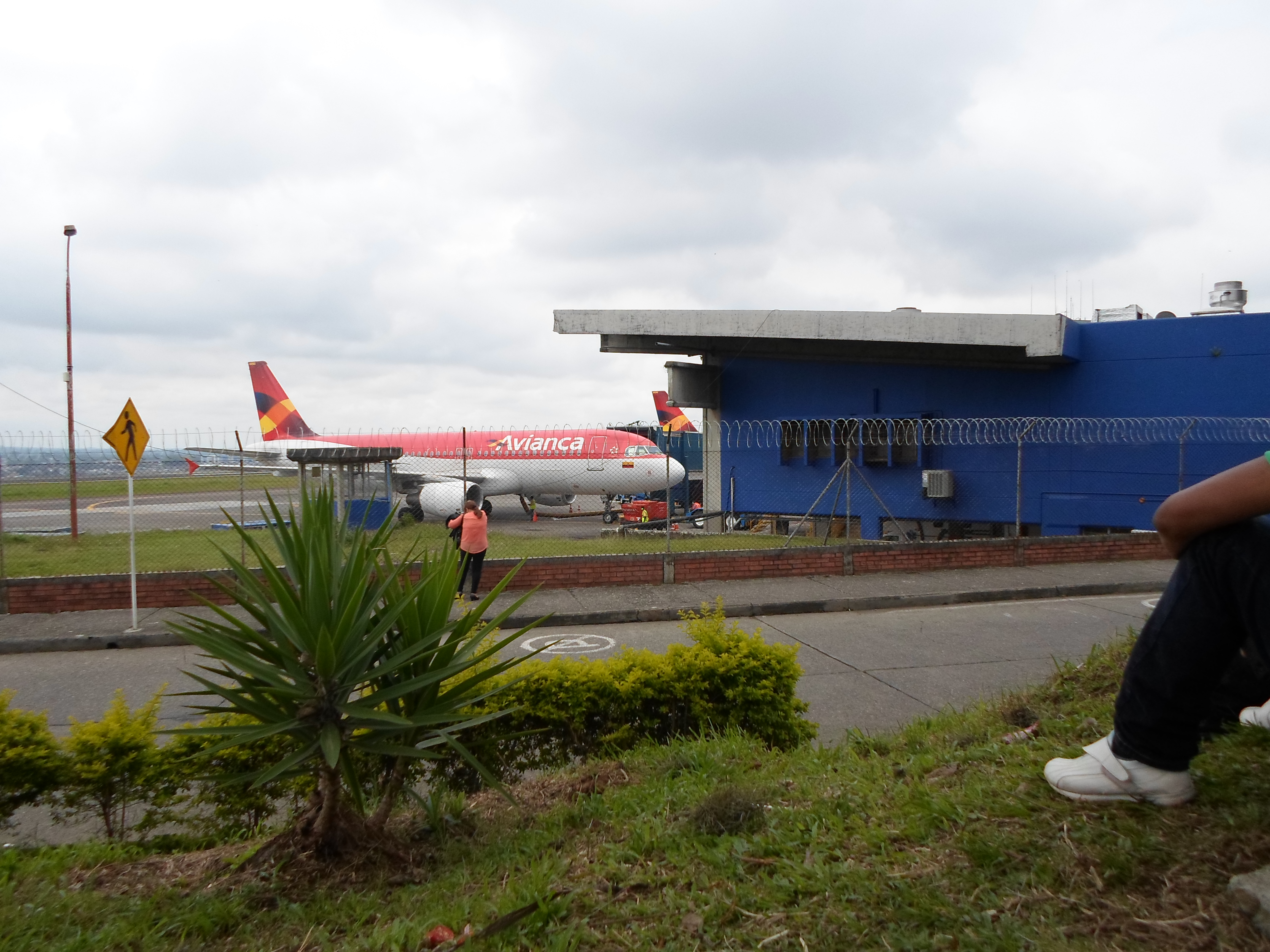 Aeropuerto de Pereira